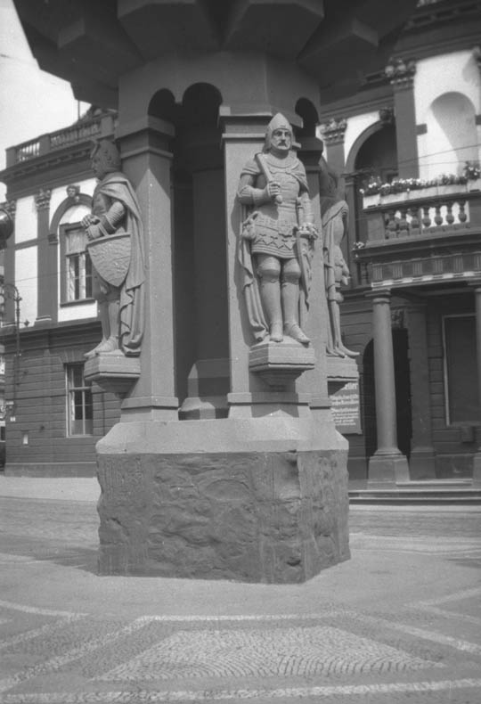 Kaiser Otto Denkmal på Alter Markt Motiv: Magdeburg Kategori: Stadsmiljö, Skulpturer Kaiser Otto Denkmal på Alter Markt.